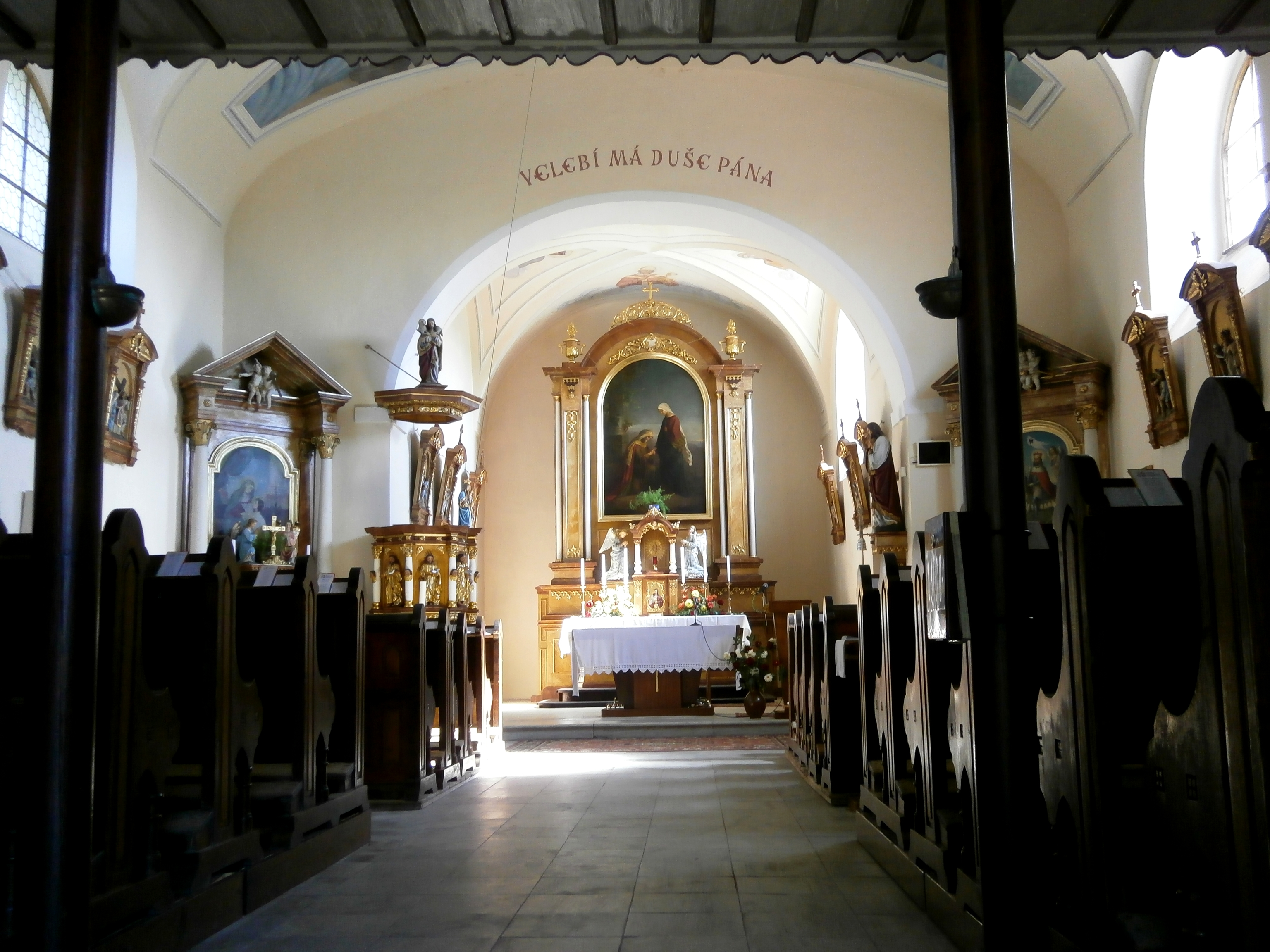 Kostel Navštívení Panny Marie (Boušín)